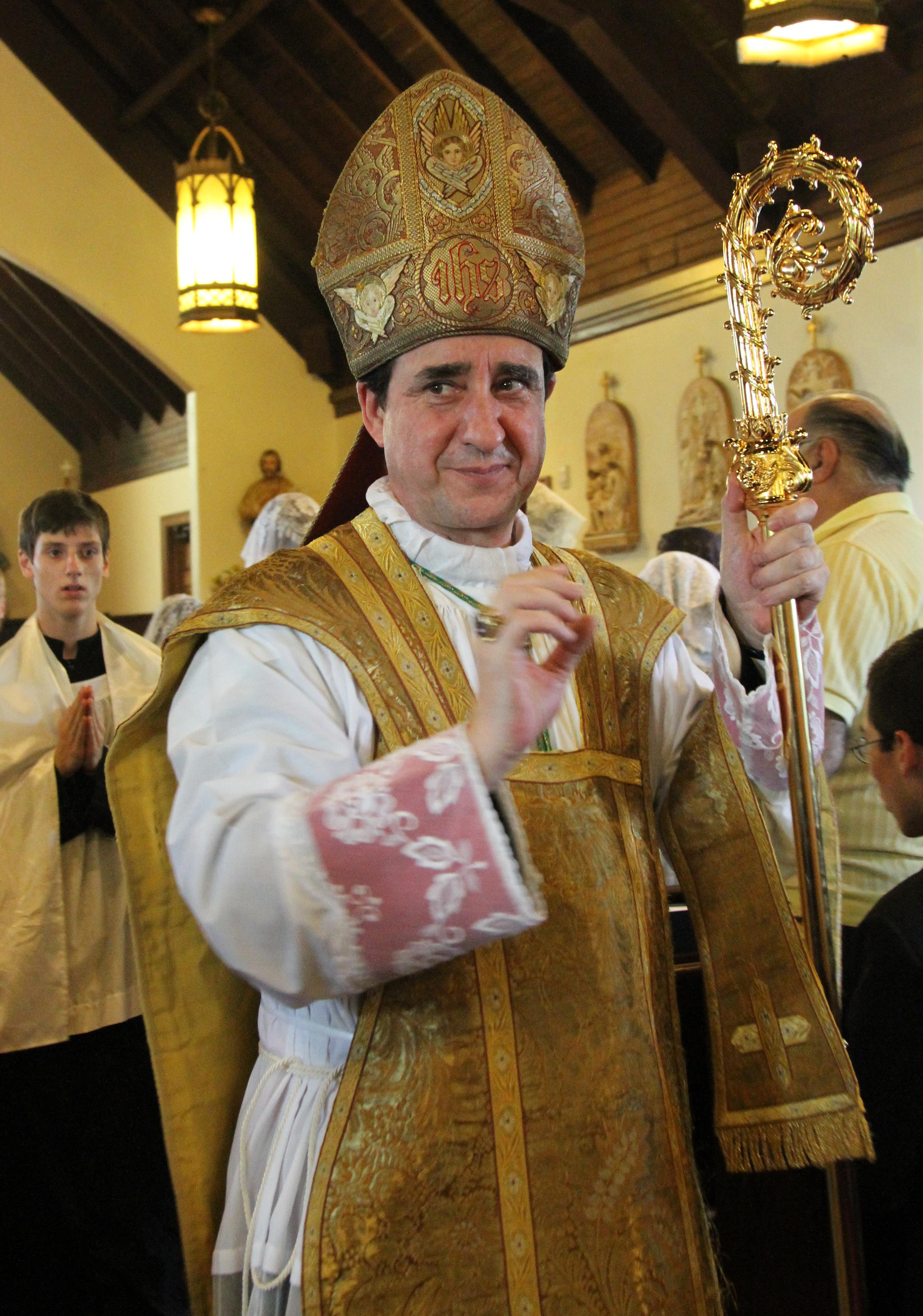 Ilustrísimo y Reverendísimo don Alfonso de Galarreta